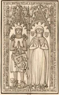 dessin relevé pour gaignières, conservé à la BNF et numérisé par Gallica.